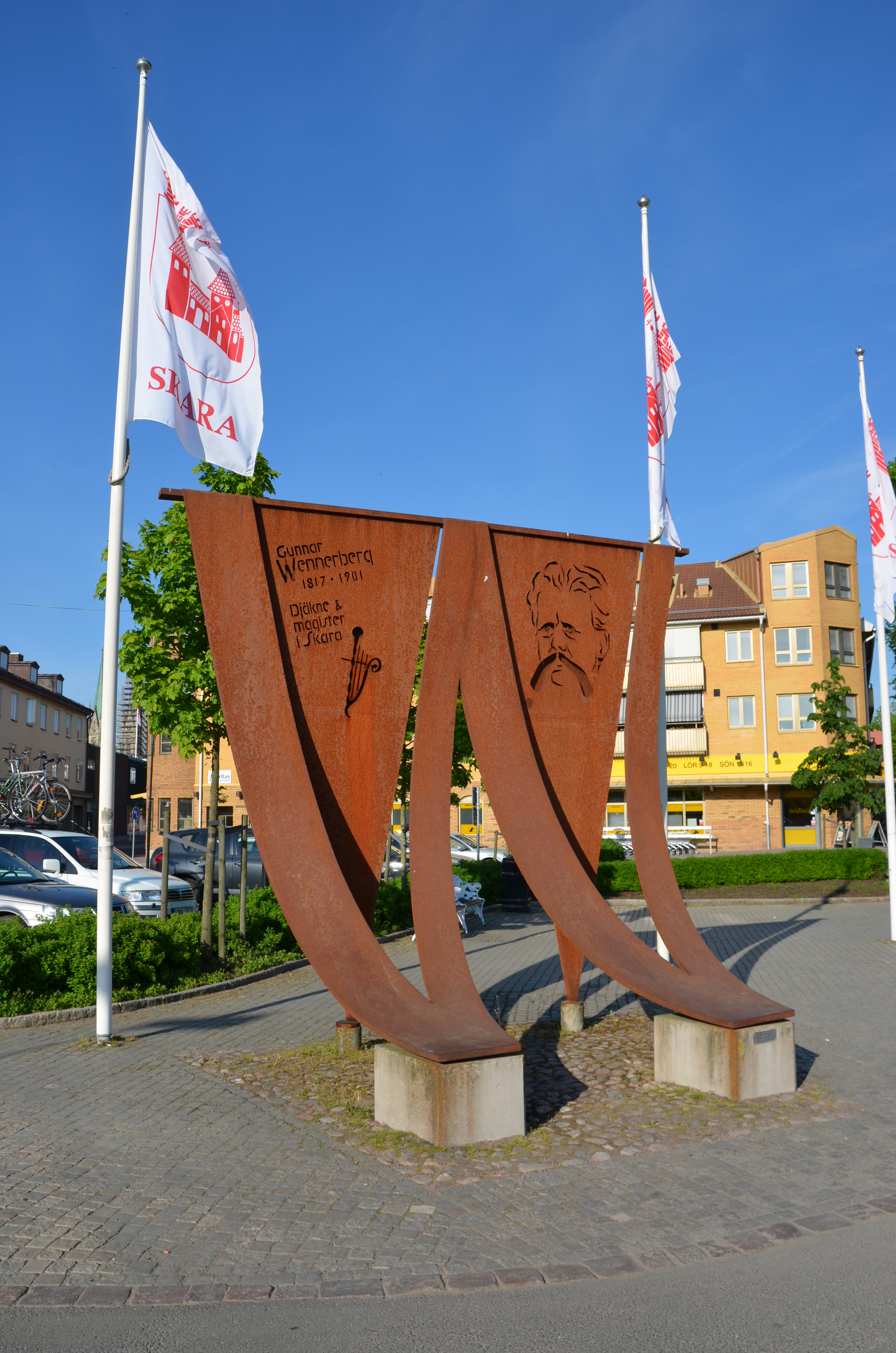 Lenny Clarhälls Minnesmärke över Gunnar Wennerberg, Marumstorget i Skara, 2003, cortenstål